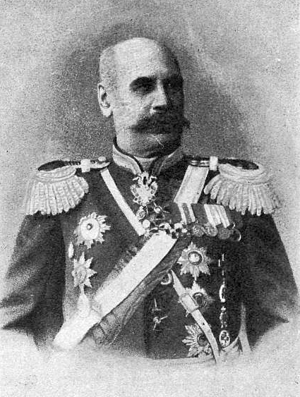 Унтербергер, Павел Фридрихович (1842—1921)